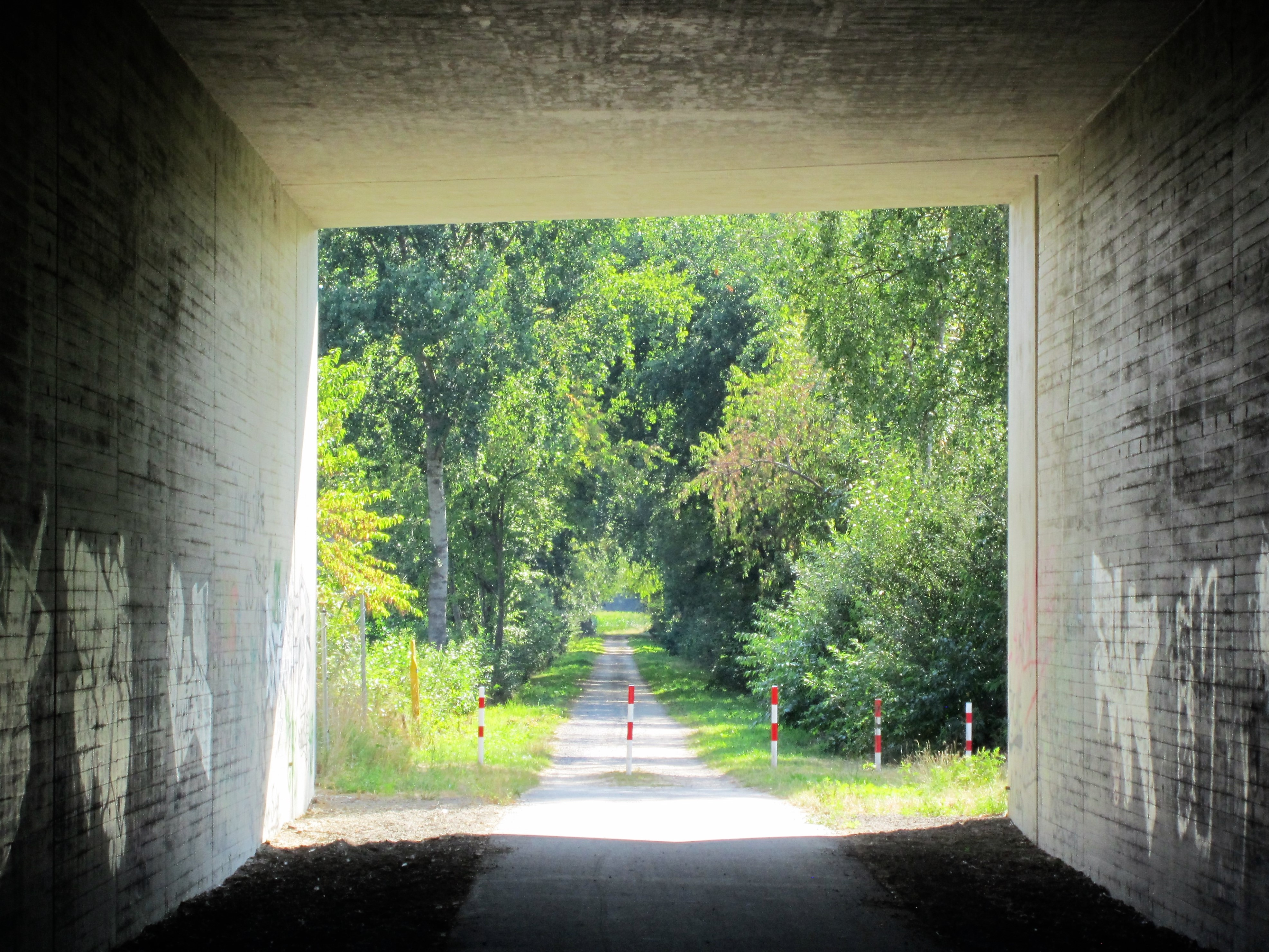 Unterführung der ehemaligen Kleinbahnlinie Lohne - Dinklage unter der A 1 in Brockdorf-Nord (Lohne); jetzt Radweg. Blick Richtung Westen (Dinklage)